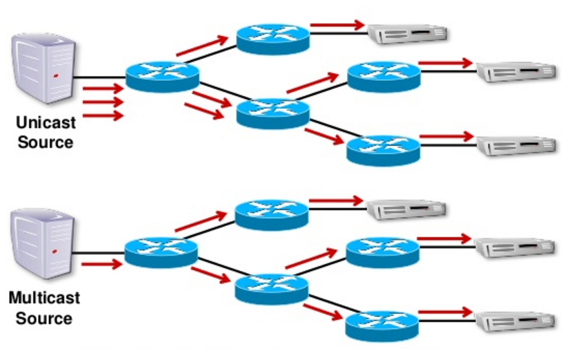 Comparación entre multicast y unicast